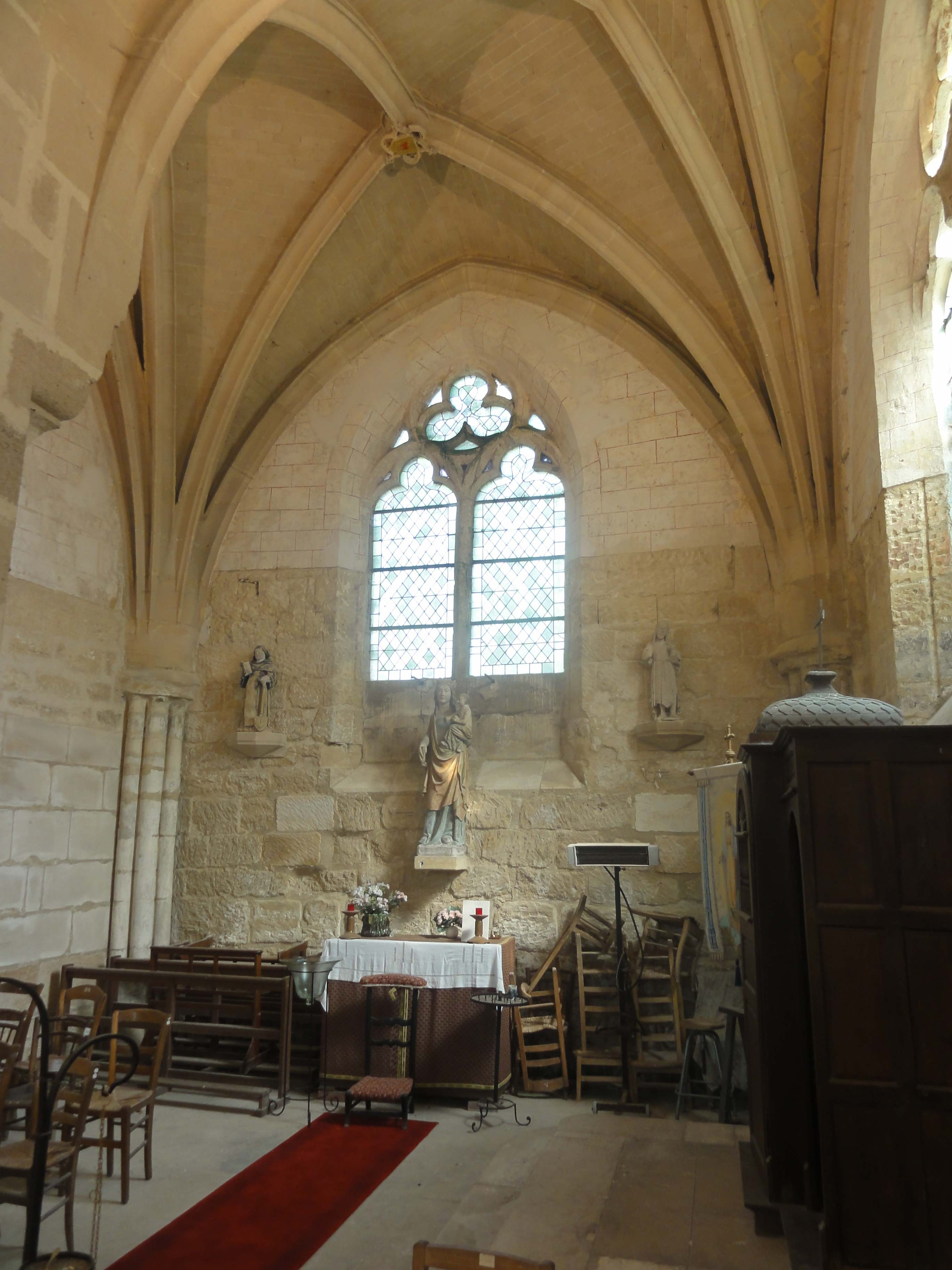 Croisillon nord, côté nord.